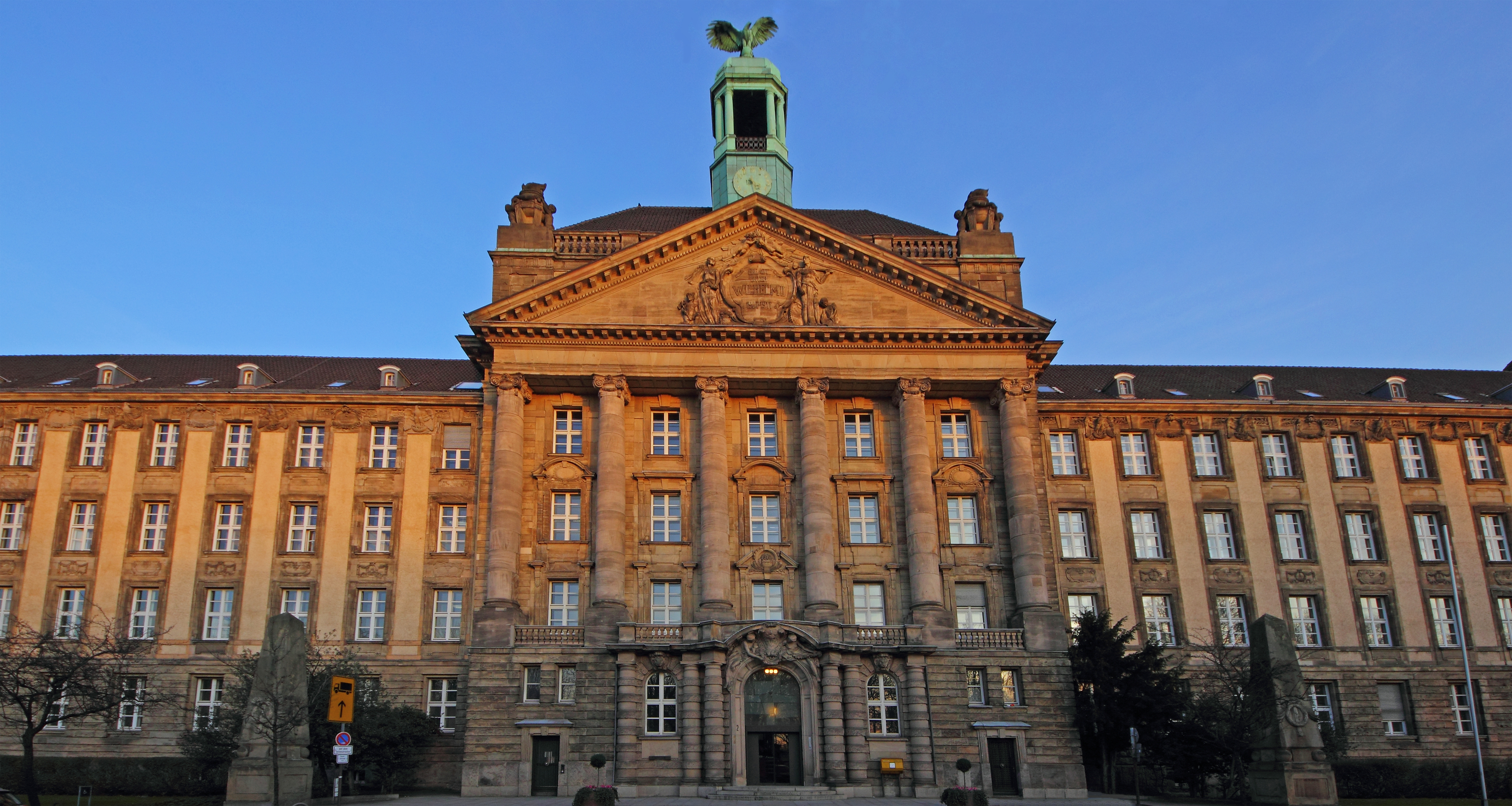 Dienstgebäude der Bezirksregierung Düsseldorf an der Cecilienallee